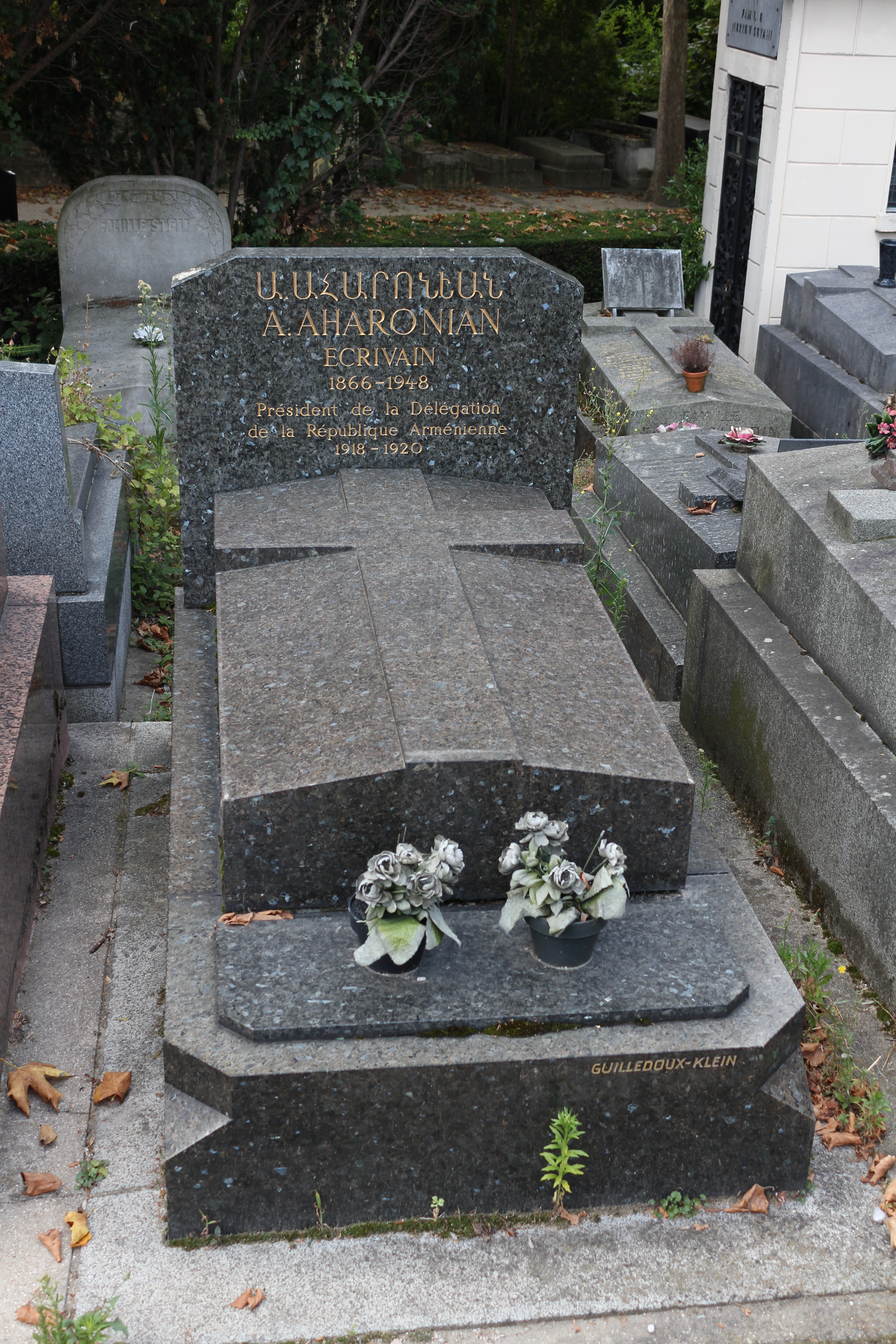 Vue d'ensemble